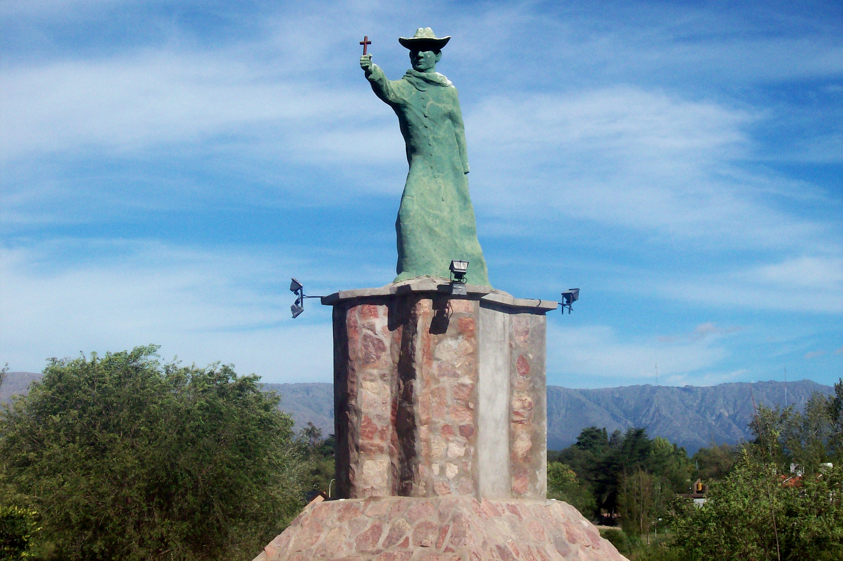 Monumento a José Gabriel Brochero, en Villa Cura Brochero, provincia de Córdoba, Argentina.